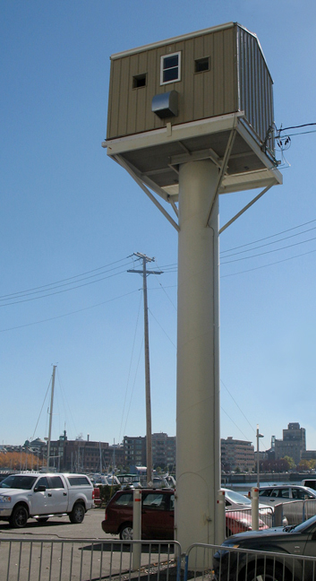 Une des cabines de projection du Moulin à images installées au pied des silos de la Bunge, dans le bassin Louise à Québec.